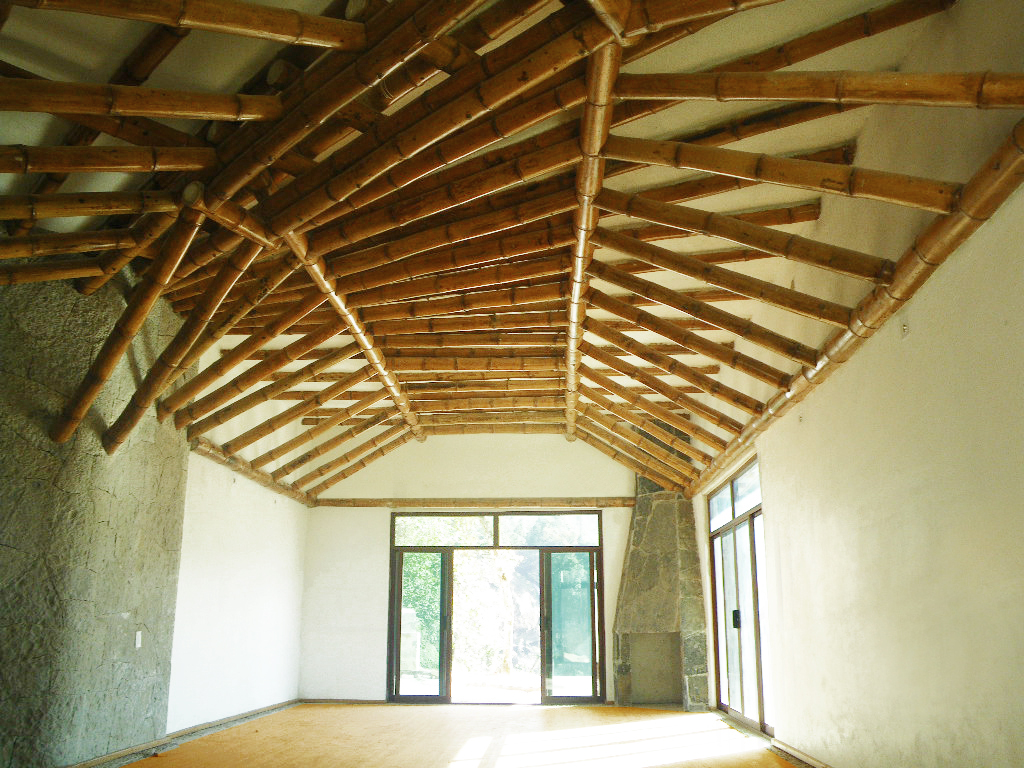 Casa habitación residencial construida completamente con bambú en la sierra norte de Puebla